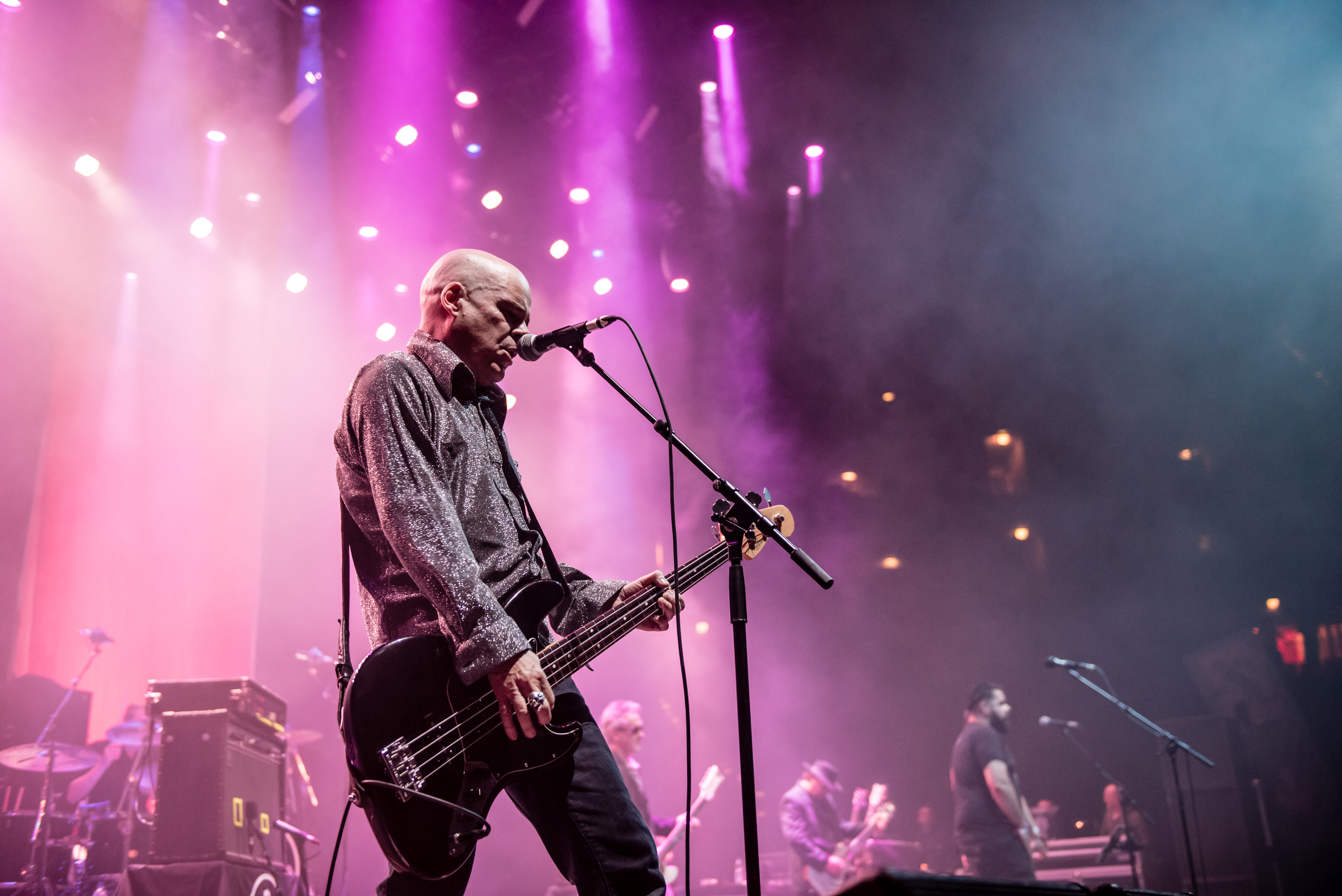 'Amphi Festival 2015; Köln - Lanxess Arena': 'The Mission'